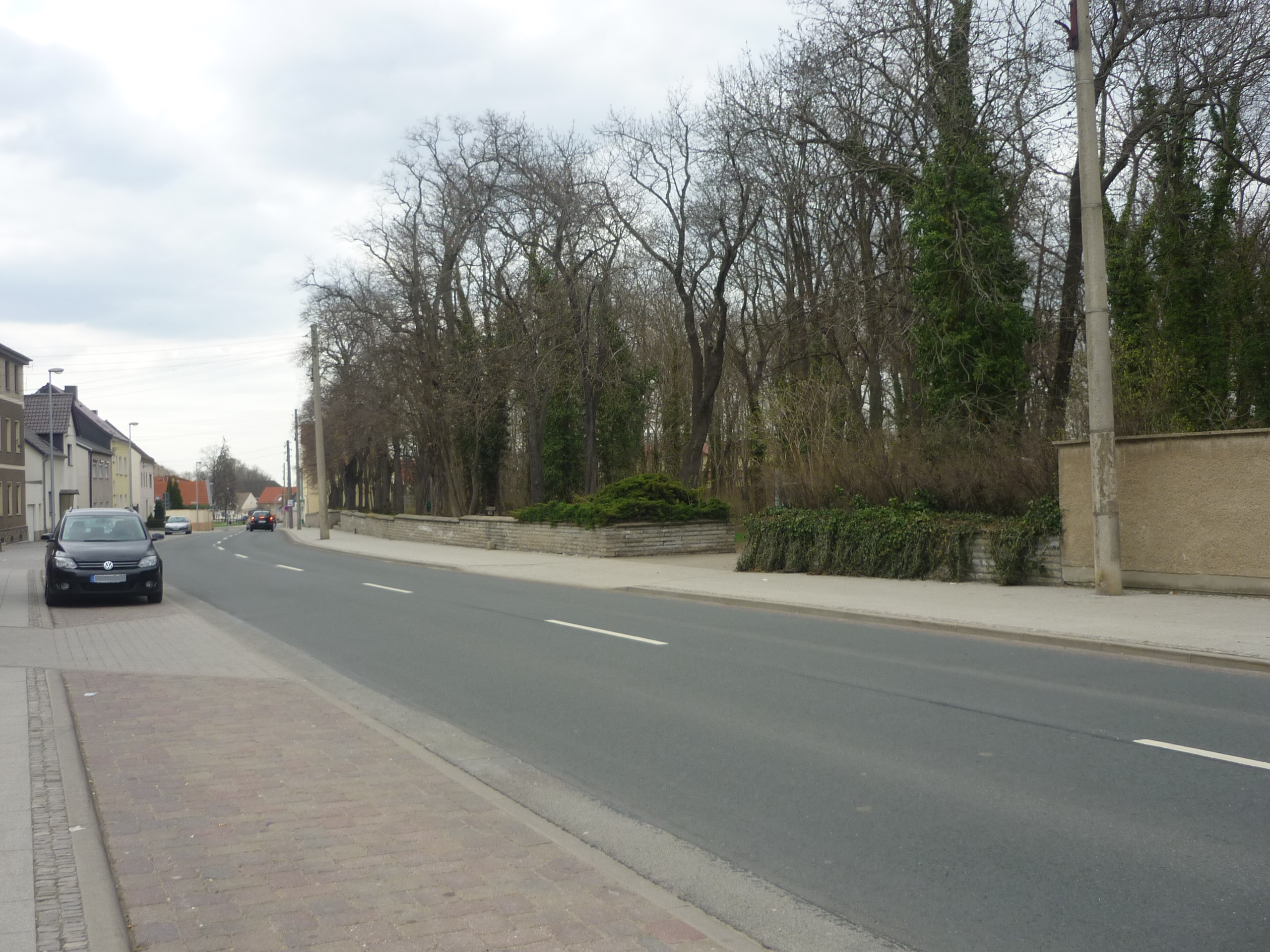 HaLöd